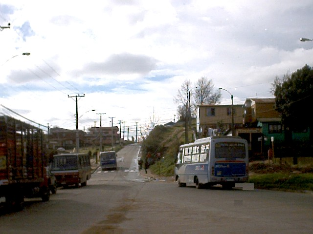 Taxibus ruta las playas.